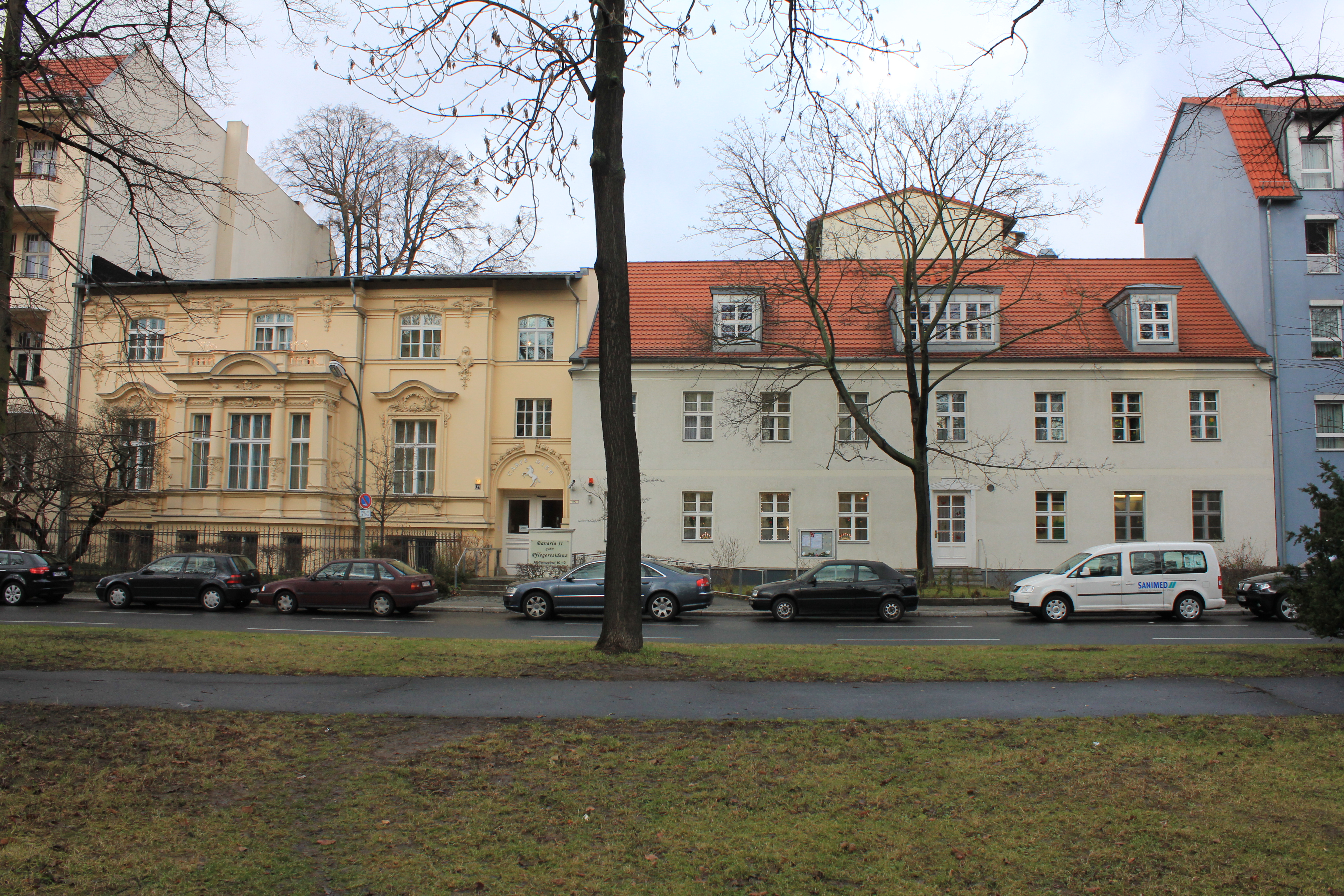 Bauernhaus Mitte 19. Jh., Umbauten 1924 und 1931; Villa 1888-89, von Paul Opitz